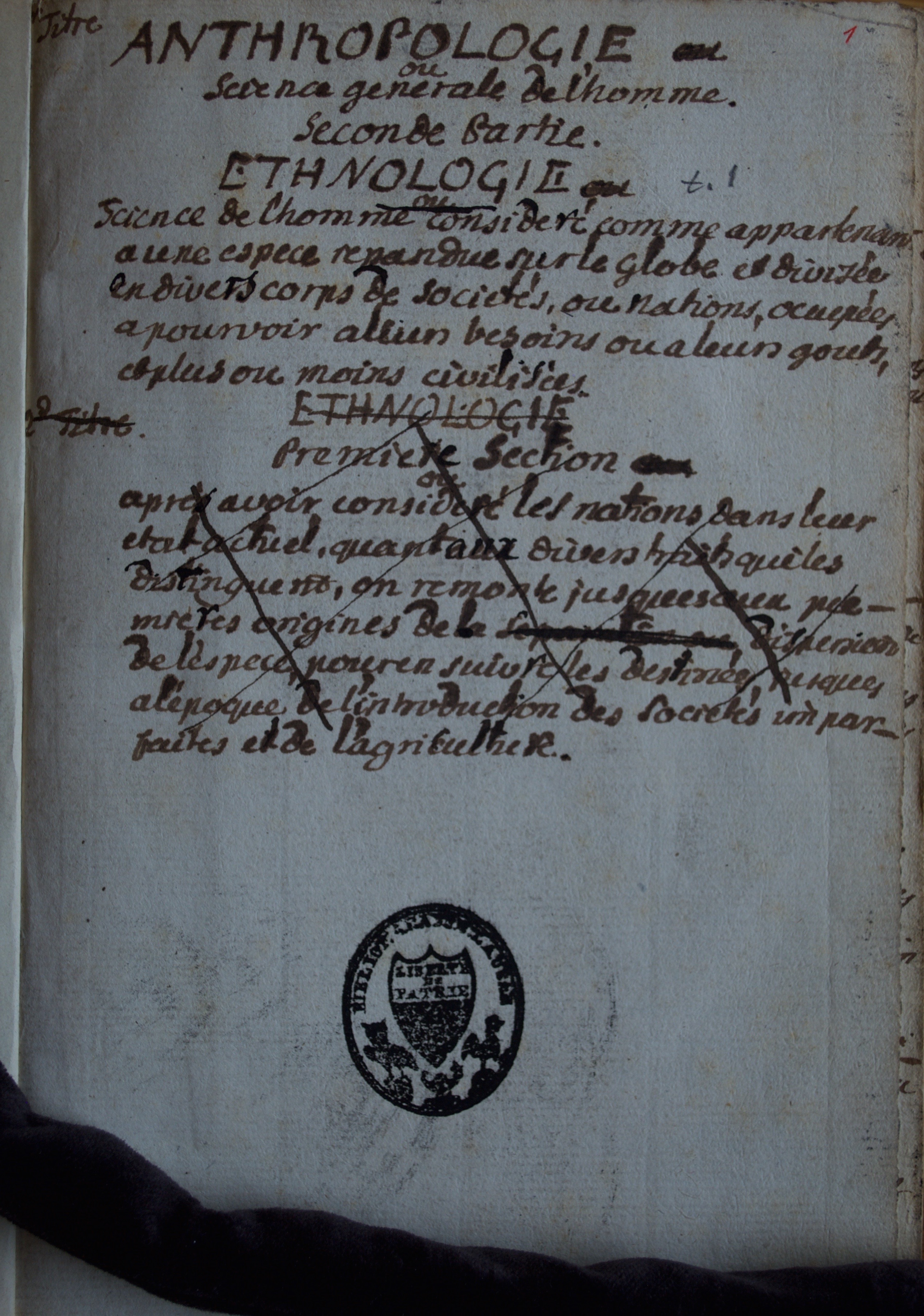 Volume appartenant à l'Anthropologie d'Alexandre César Chavannes, [Lausanne], [1750-1788].